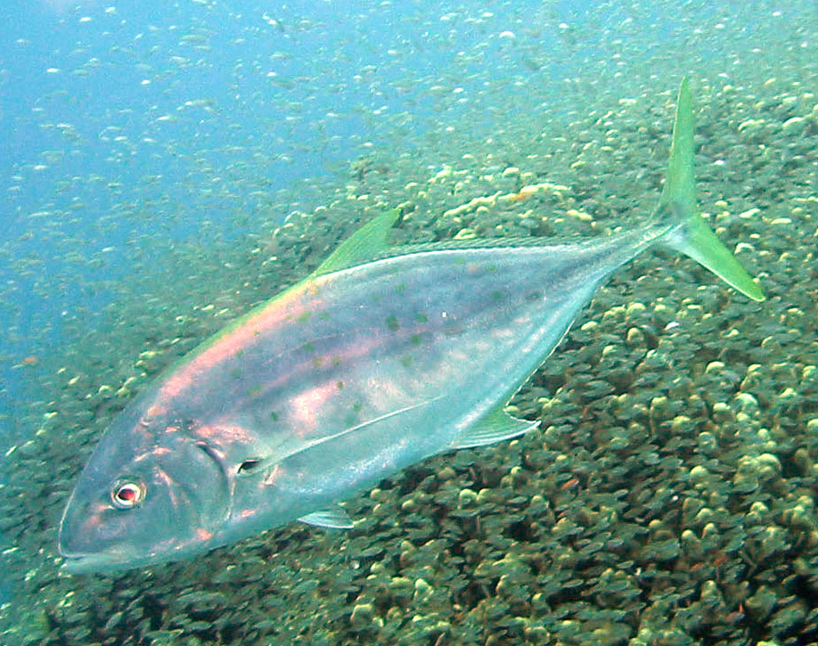 orangespotted trevally